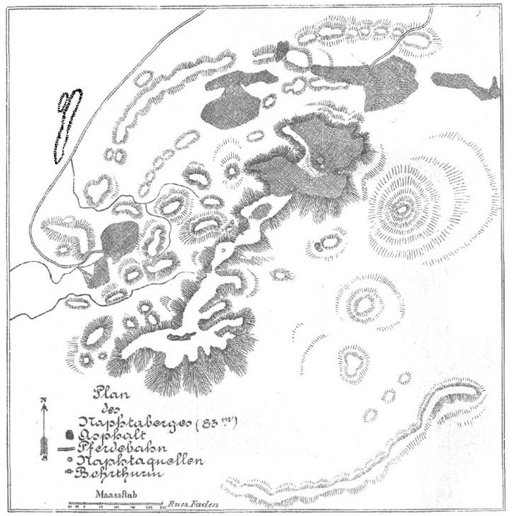 Plan des Naphtaberges in 'Ueber das transkaspische Naphtaterrain' von Dr. Hj. Sjögren in Baku